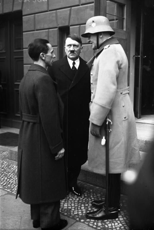 Volkstrauertag am 25. Februar 1934. Reichskanzler Adolf Hitler, Propagandaminister Dr. Goebbels, Reichswehrminister v. Blomberg.